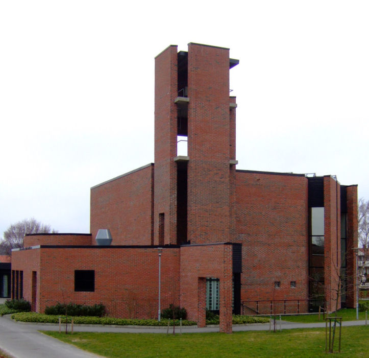 Stokka kirke, Stavanger Norway